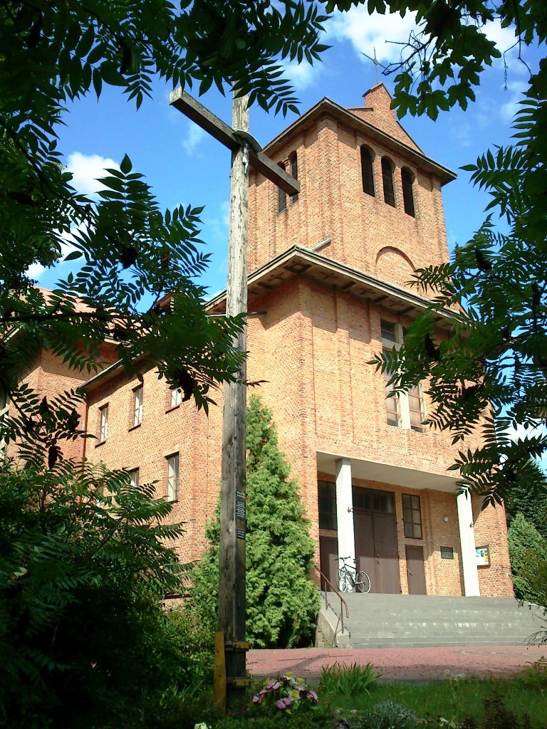 Kochanów (Gemeinde Głuchów): Kirche St. Josef der Pfarre Sankt Josef und Unsere Liebe Frau von Tschenstochau, erbaut 1977-1979